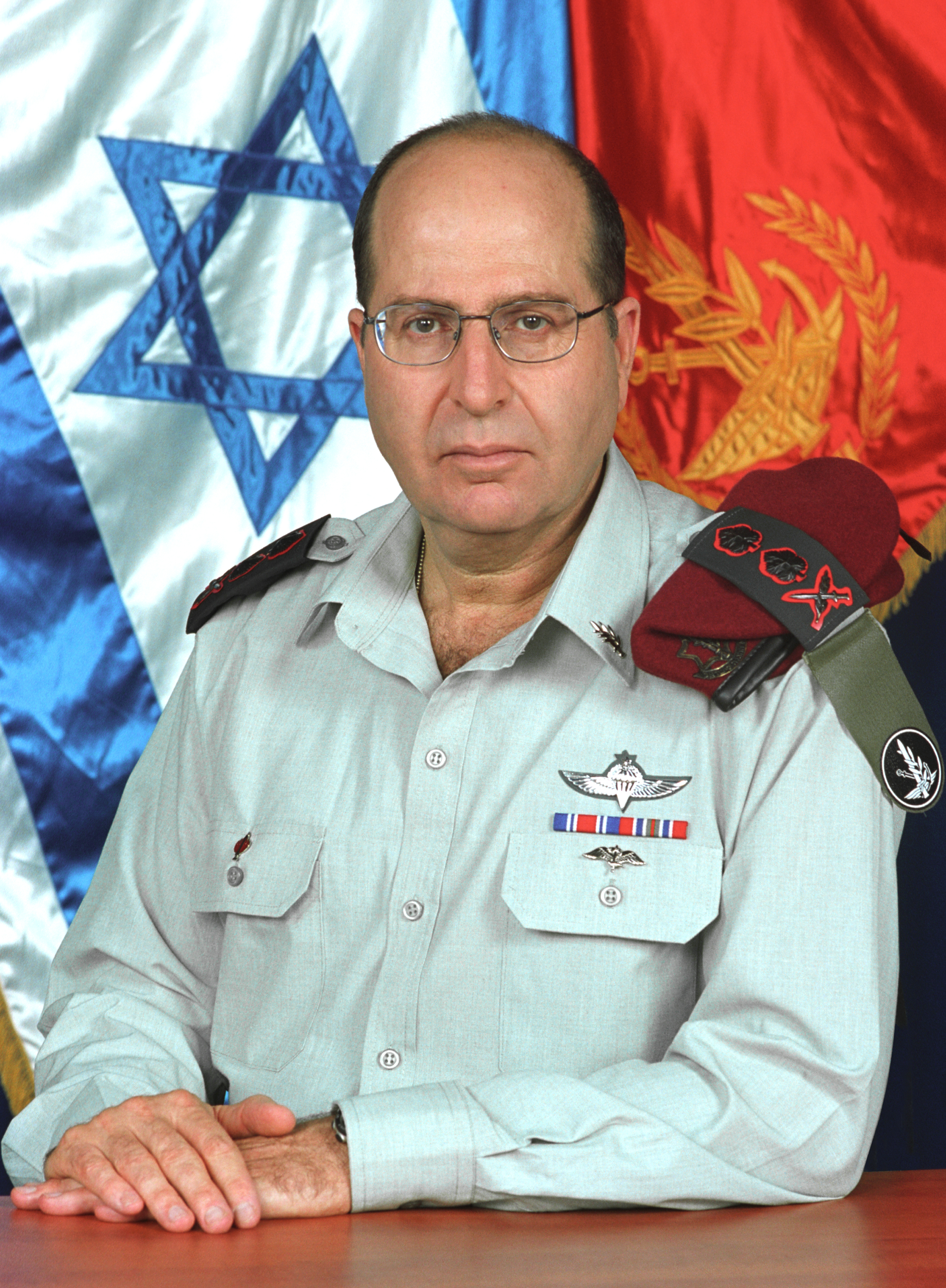 הרמטכ"ל רא"ל משה "בוגי" יעלון.